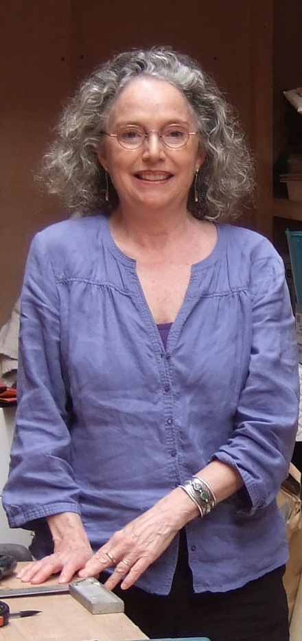 Sara Holt, Paris, 2014